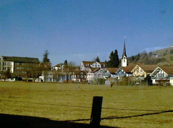 Ebnat-Kappel village with church - Ebnat-Kappel - vilagxo kun pregxejo